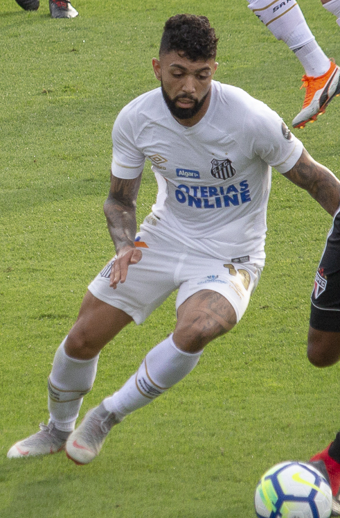 Foto: Douglas Teixeira/Futebol Santista